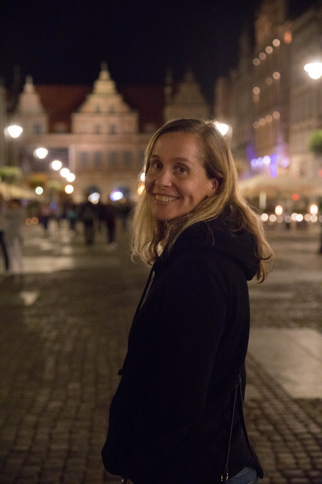 תמונה של ד"ר ליאת שטייר לביני לקראת הרצאתה בכנס